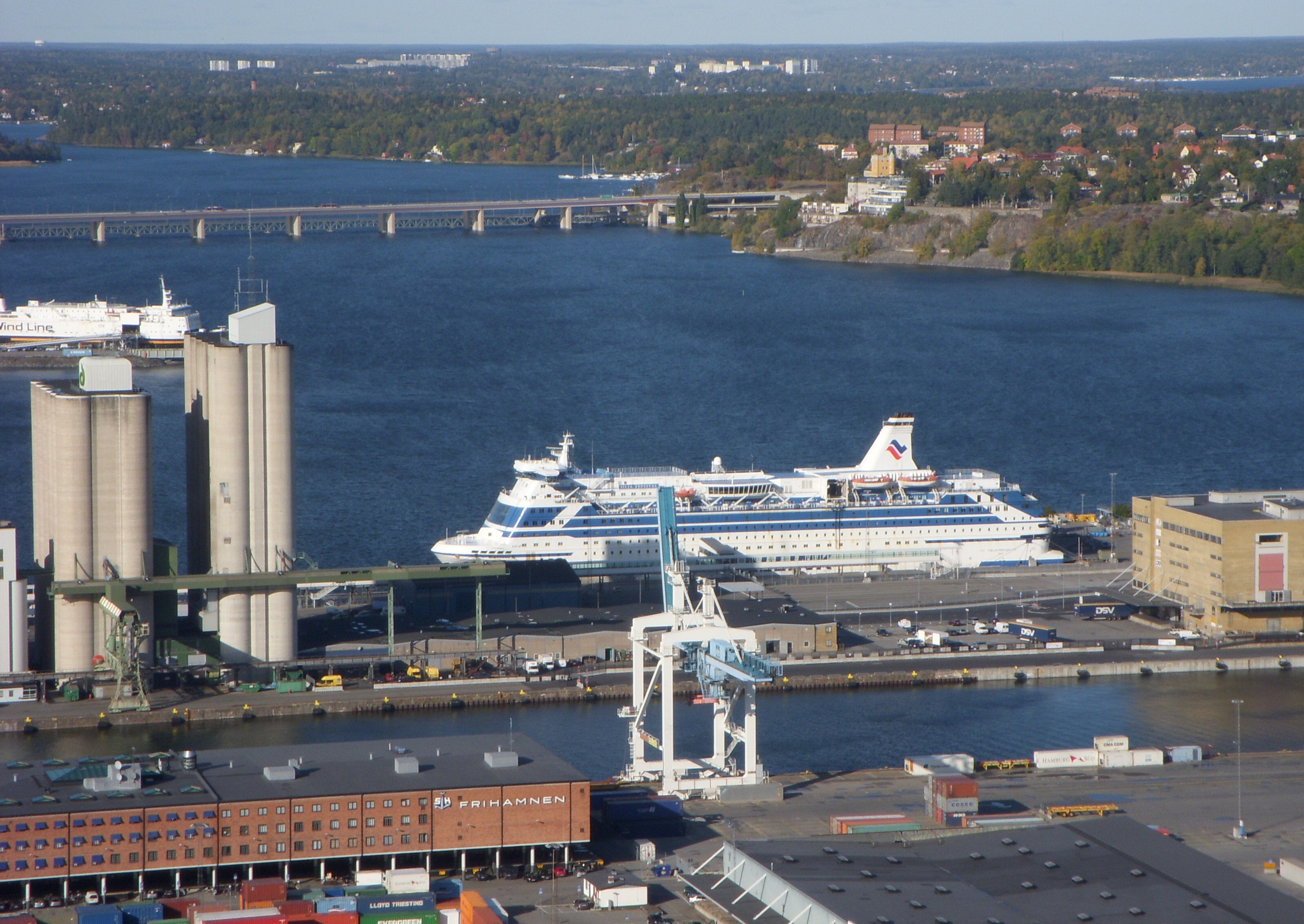 Stockholms frihamn, vy från Kaknästornet oktober 2009